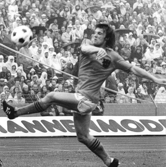 ADN-ZB-Mittelstädt-30.6.74-ma-BRD-Gelsenkirchen: X. Fußball-Weltmeisterschaft-2. Finalrunde, Gruppe A: DDR - Niederlande 0:2- DDR-Spieler Jürgen Pommerenke (links) schießt auf das Tor der Niederlande. Rechts Ruud Krol (Niederlande). Information added by Wikimedia users.Football player Ruud Krol